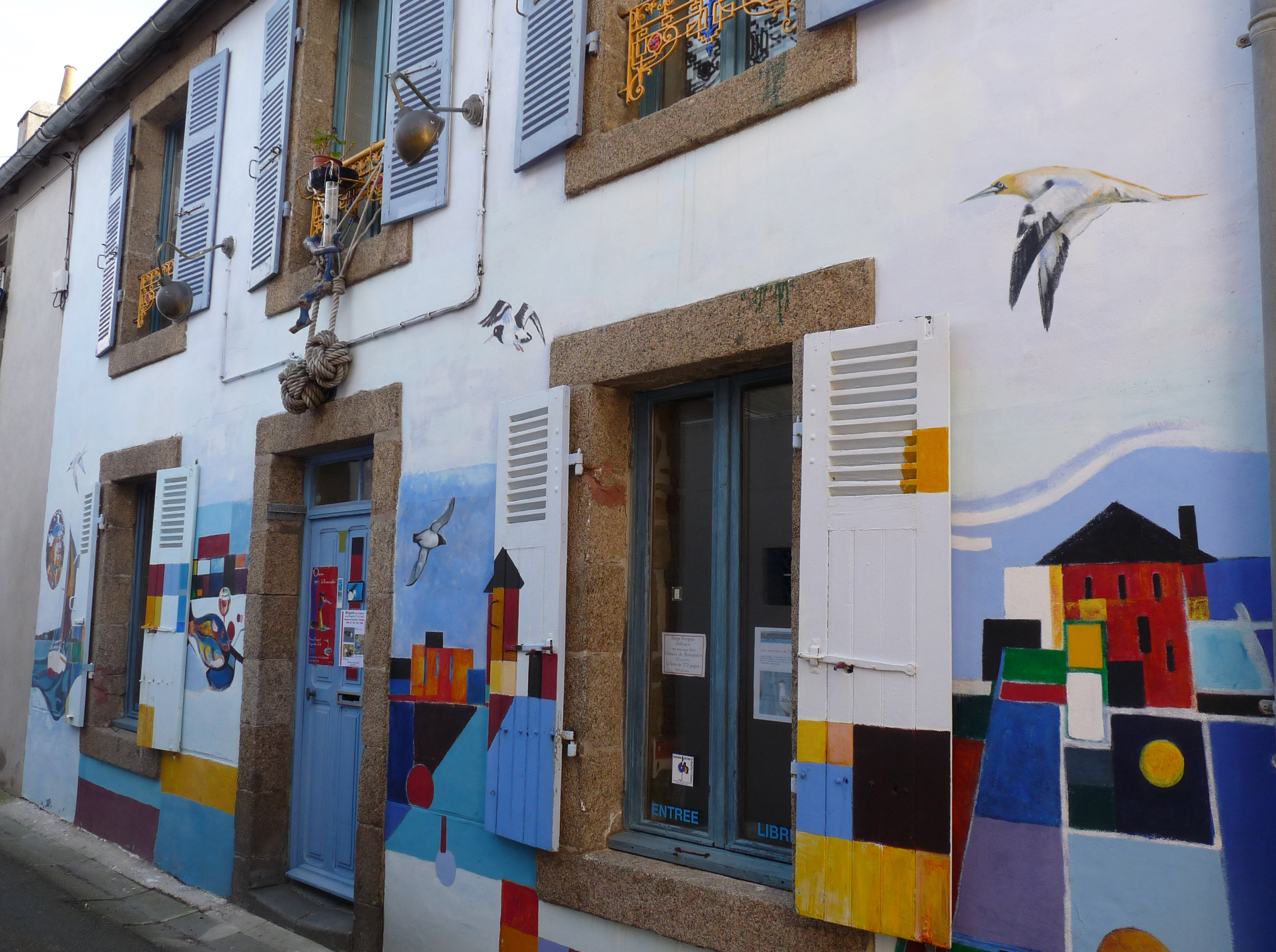 Saint Thomas, le quartier des artistes à Camaret-sur-Mer (Finistère)